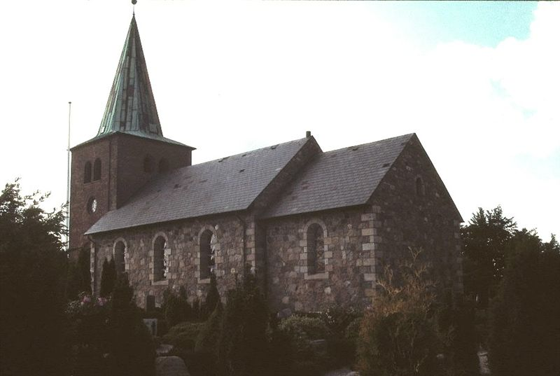 Almind Kirke (Kolding Kommune) i Danmark. Almind kirke